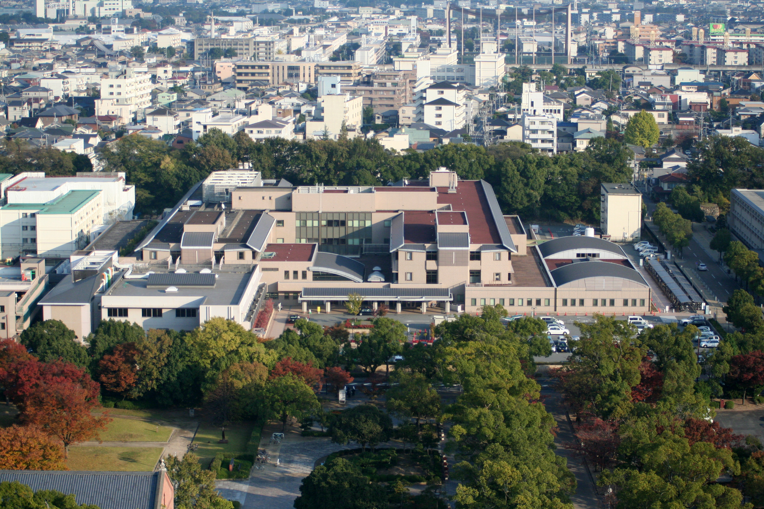 2009年秋の姫路城。 姫路医療センター。